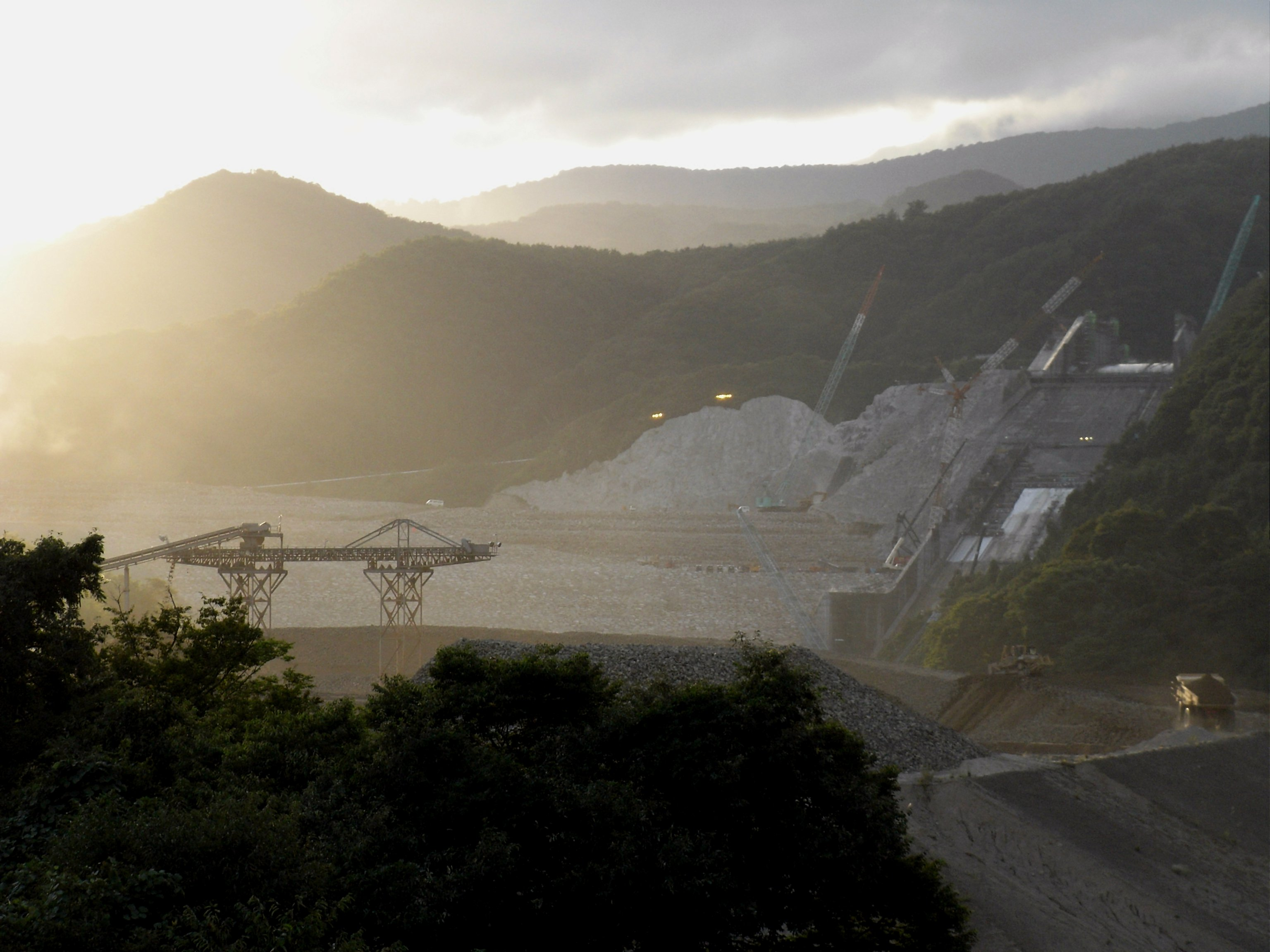 Dam